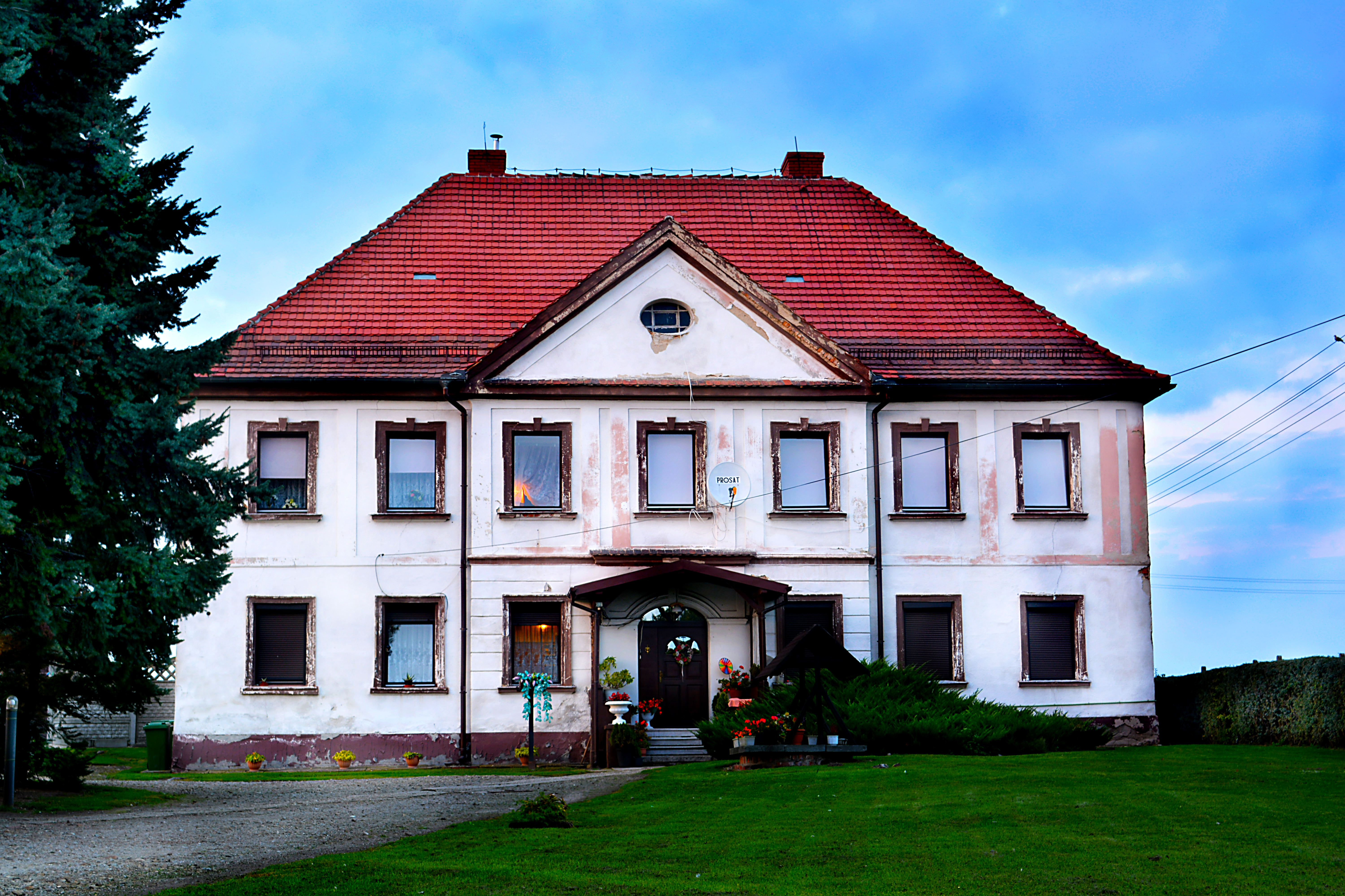 Bieńkowice, plebania, 1801